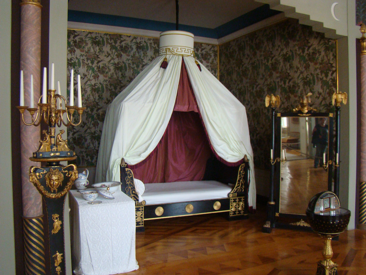 Hist. Exponate, Schlossmuseum Gotha, Schloss Friedenstein